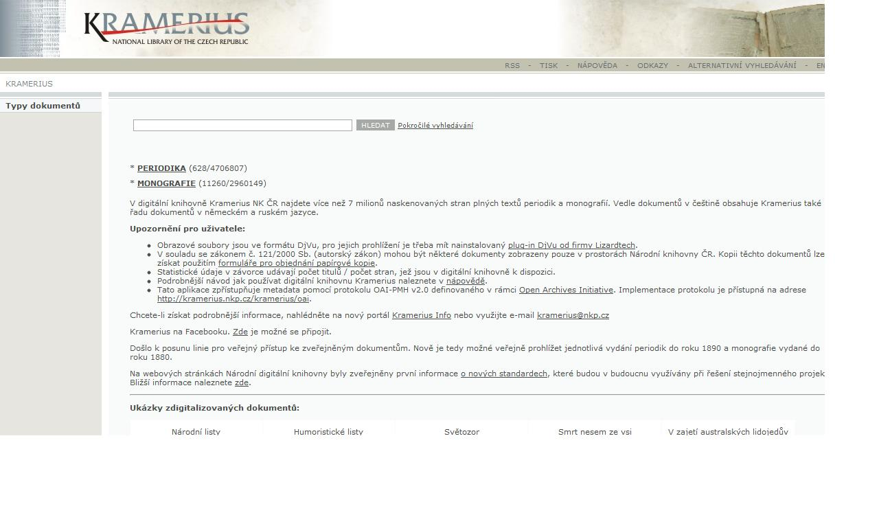 Titulní obrazovka instalace systému Kramerius Národní knihovny ČR